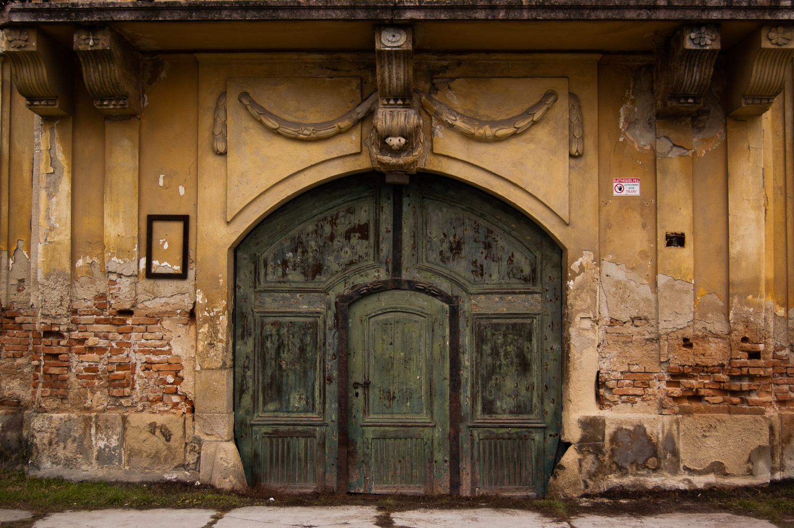 Ürményi-kastély (Vál, Magtár utca 2.)